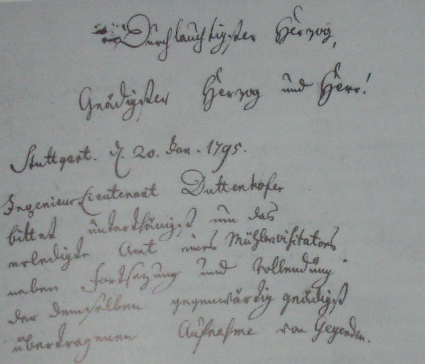 Bewerbungsschreiben Karl August Friedrich Duttenhofers um eine Stelle als Mühlenvisitator, 20.01.1795 (Ausschnitt)